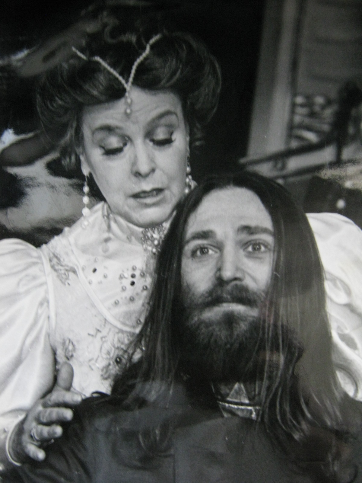 Театр "Патриот" спектакль "Гришка Распутин". Т. Пилецкая в роли Александры, Б. Маслов в роли Распутина, режиссёр-постановщик Егоров Геннадий Семёнович